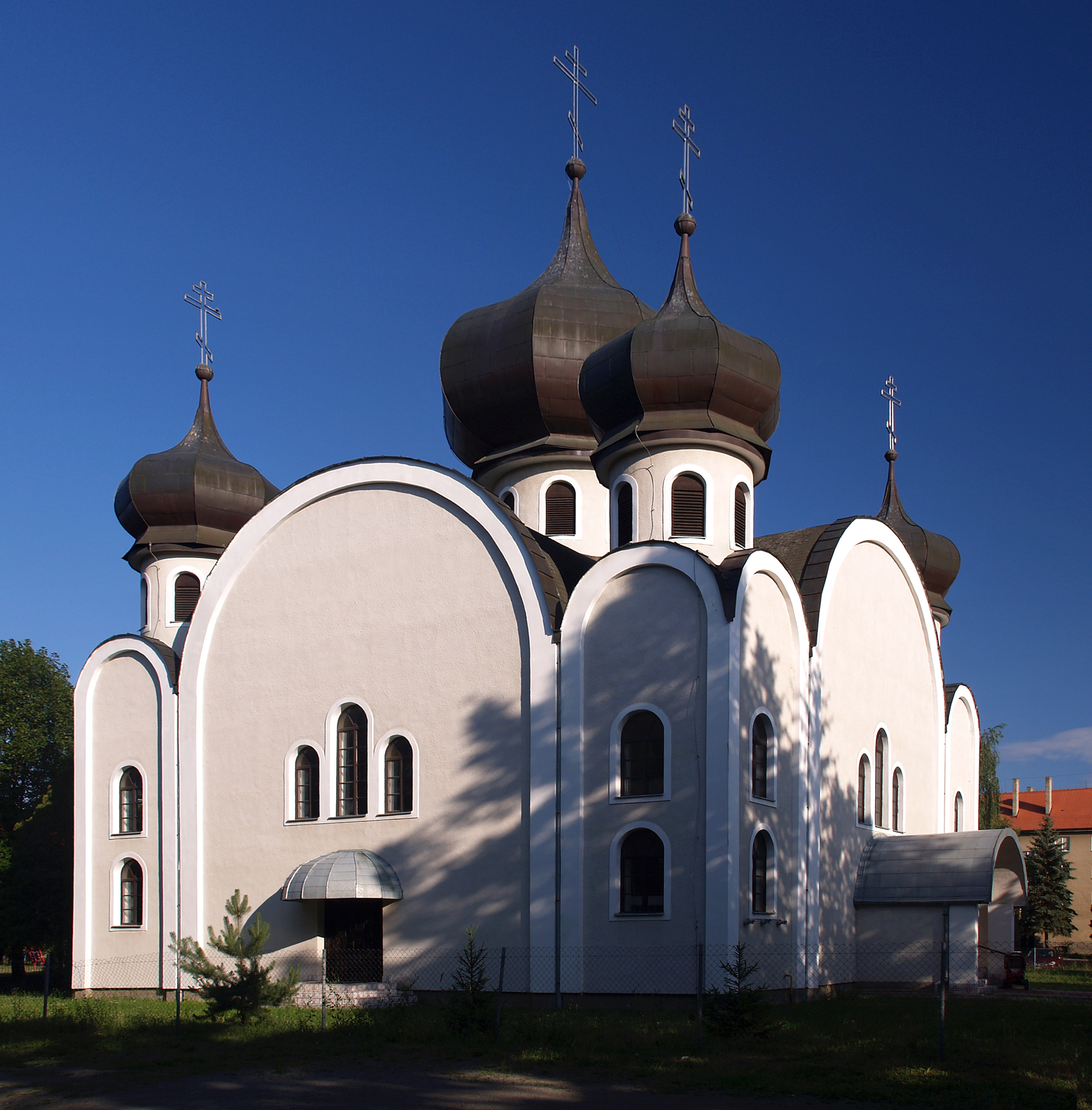 Humenné - Sts Cyrille et Méthode Pravoslávny chrám Cyrila a Metoda